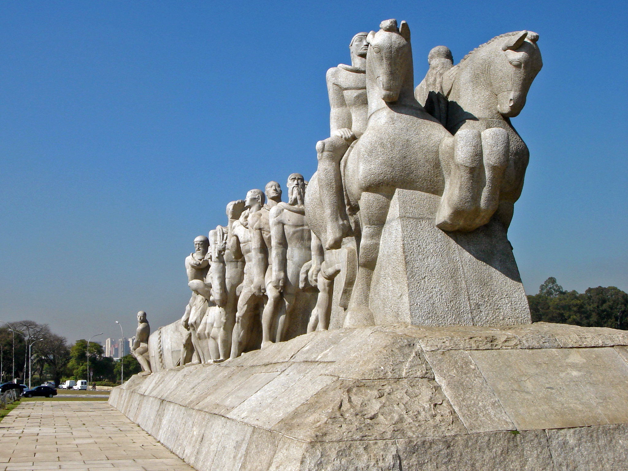 Monumento Bandeirantes, São Paulo, Brazil